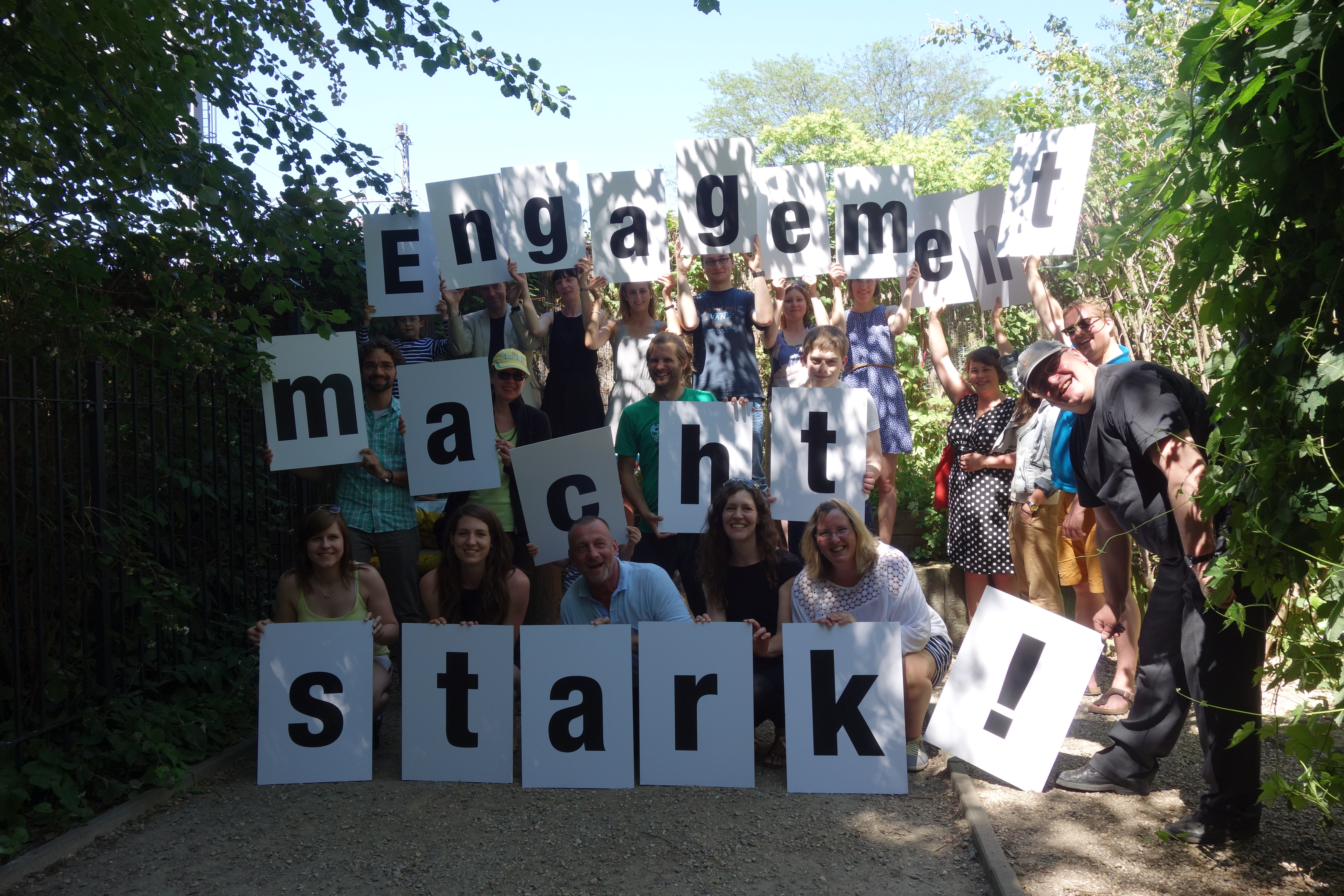 Das Team der BBE-Geschäftsstelle mit ihrer Kampagne "Engagement macht stark!"